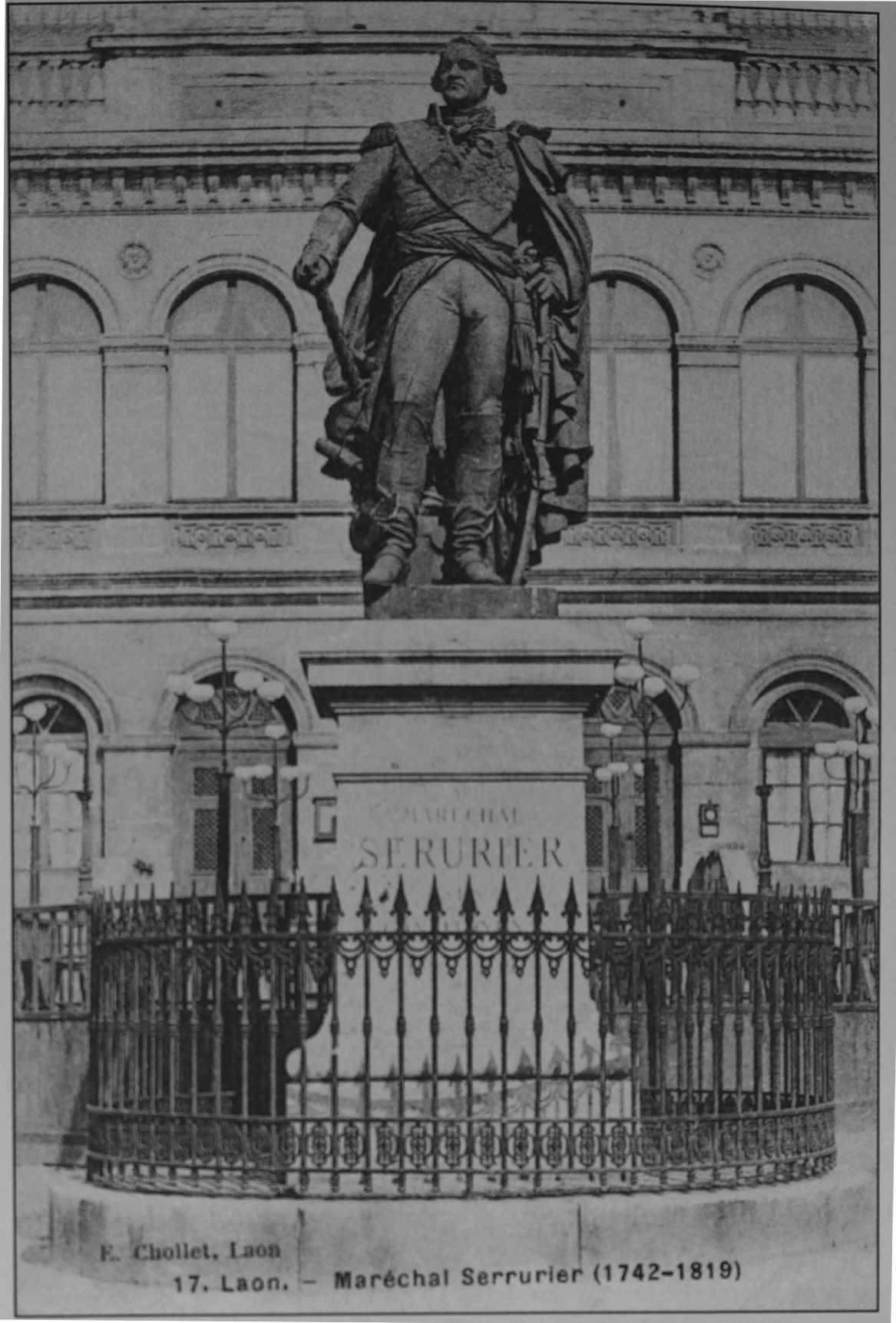 vue de la Statue de Serrurier devant la mairie.